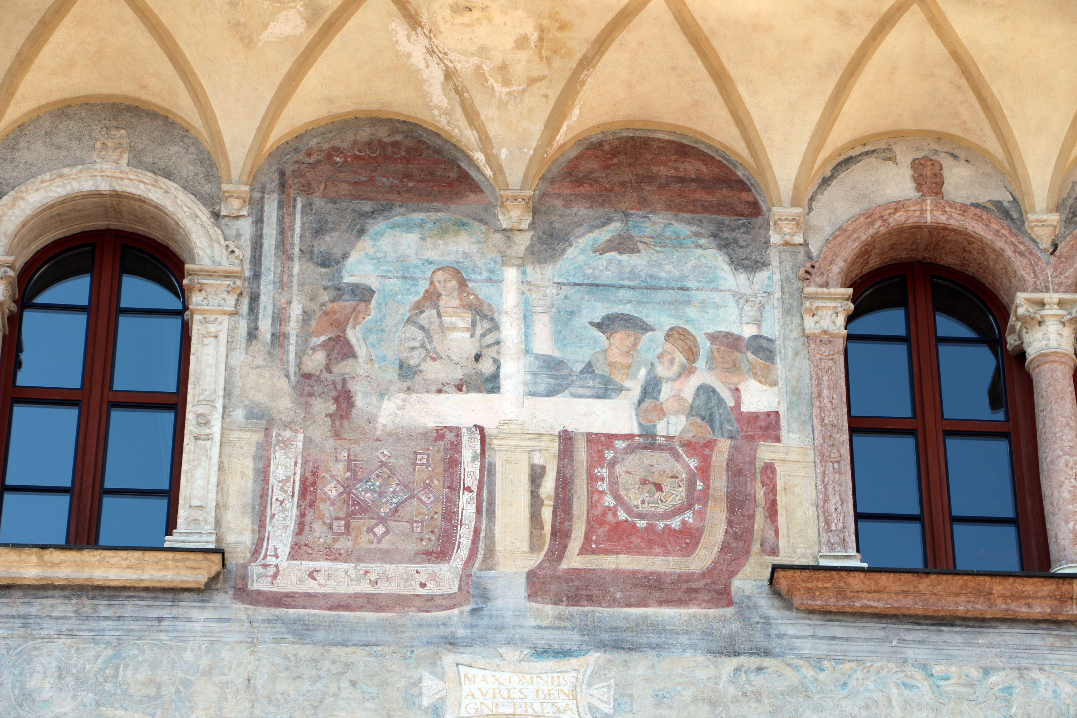 Palazzo Geremia This is a photo of a monument which is part of cultural heritage of Italy.